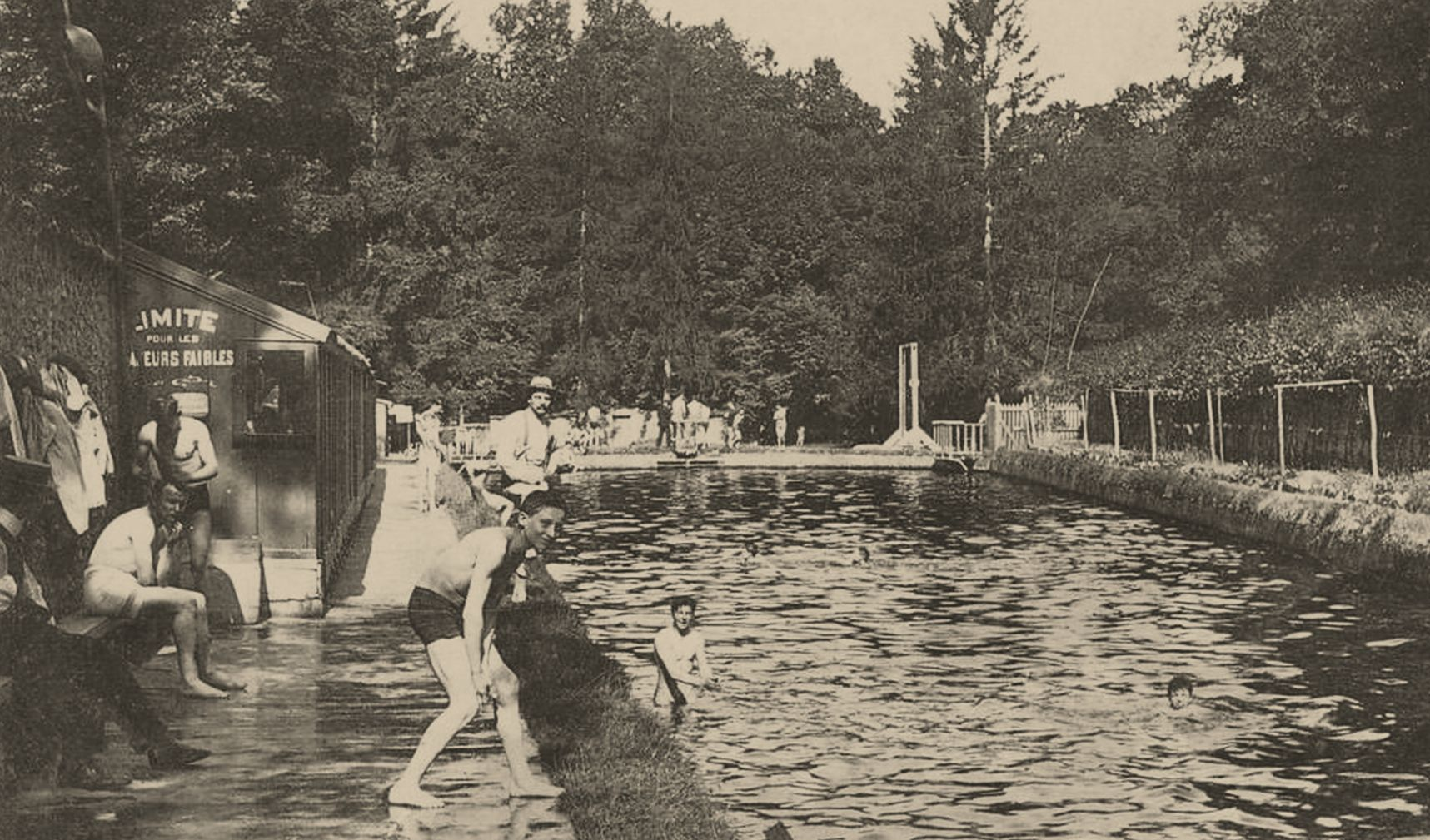 « Bains des Pages » ou « Piscine des Pages » - Carte postale vers 1910 - Pas de mention de photographe ou d'éditeur - scan